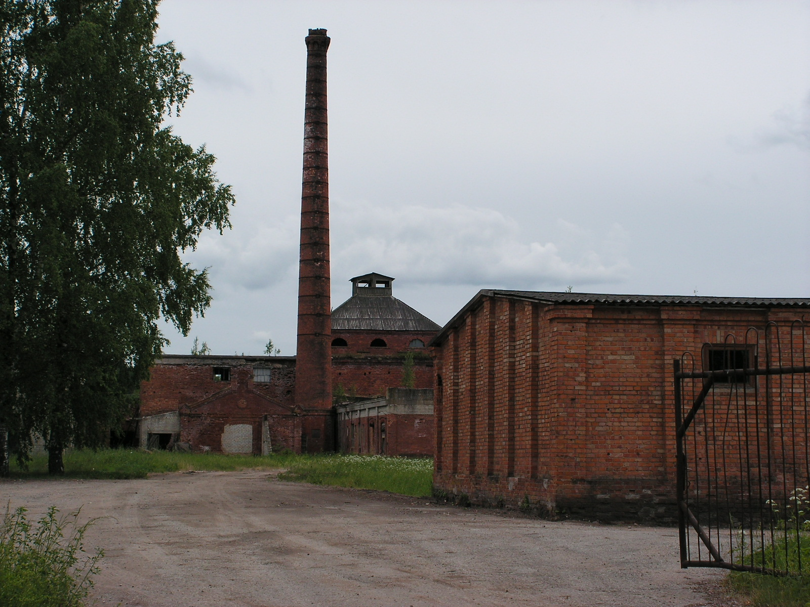 Abja linavabriku varemed 2011. aastal (Foto: Raimo Ilsjan).